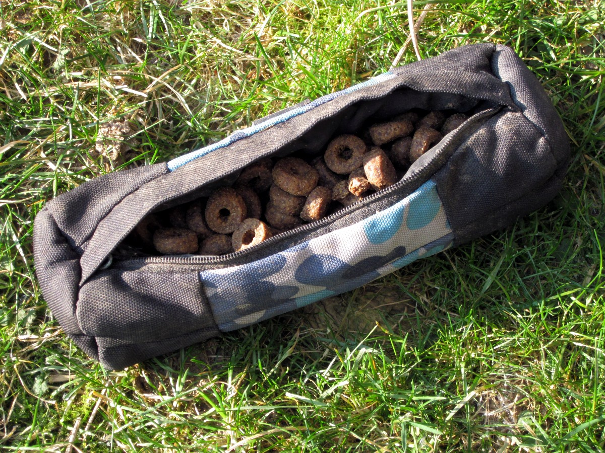 Ein mit Hundefutter gefüllter Futterdummy mit geöffnetem Reißverschluss.